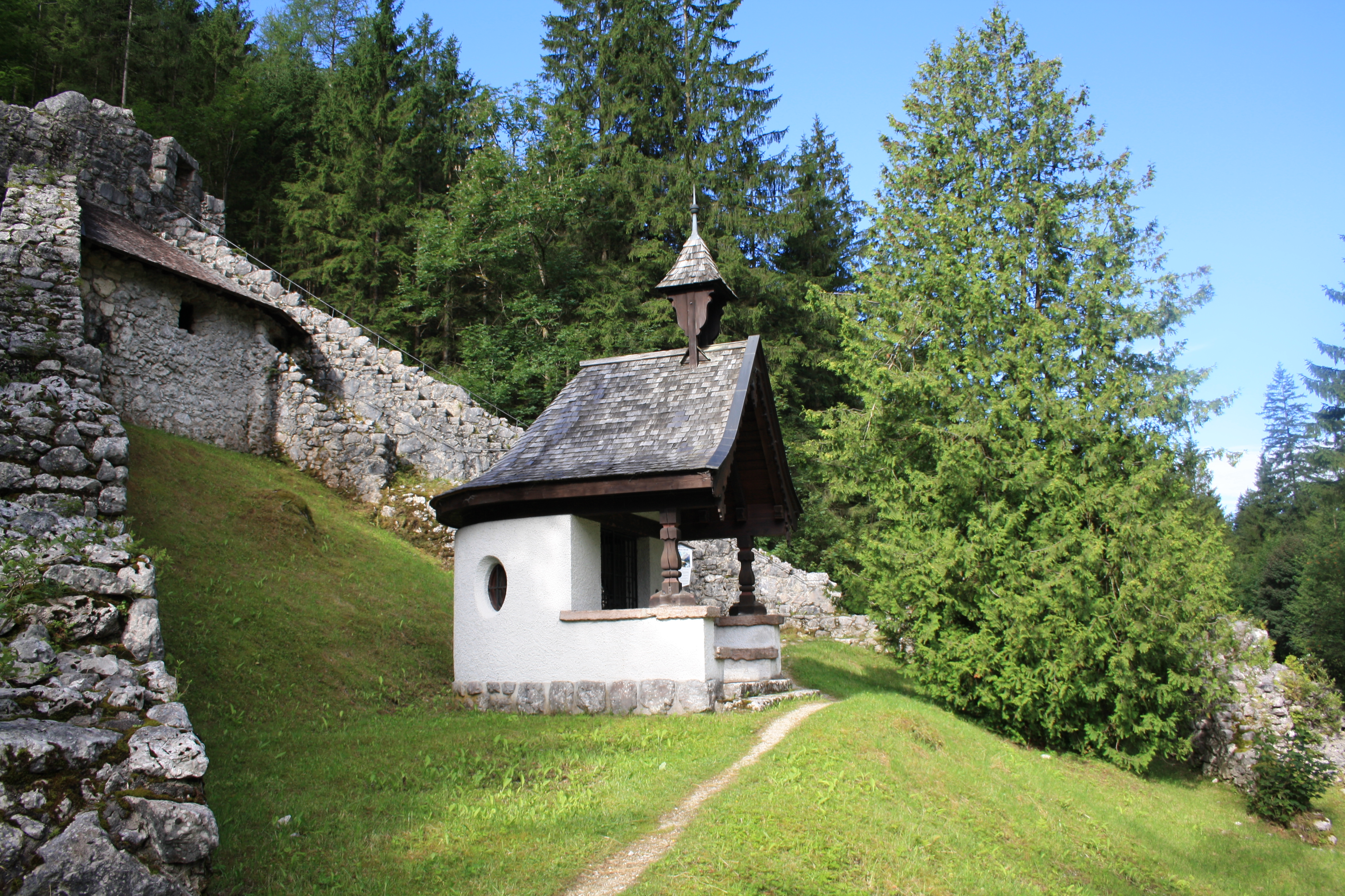 Befestigungsanlage Pass Strub mit Kapelle